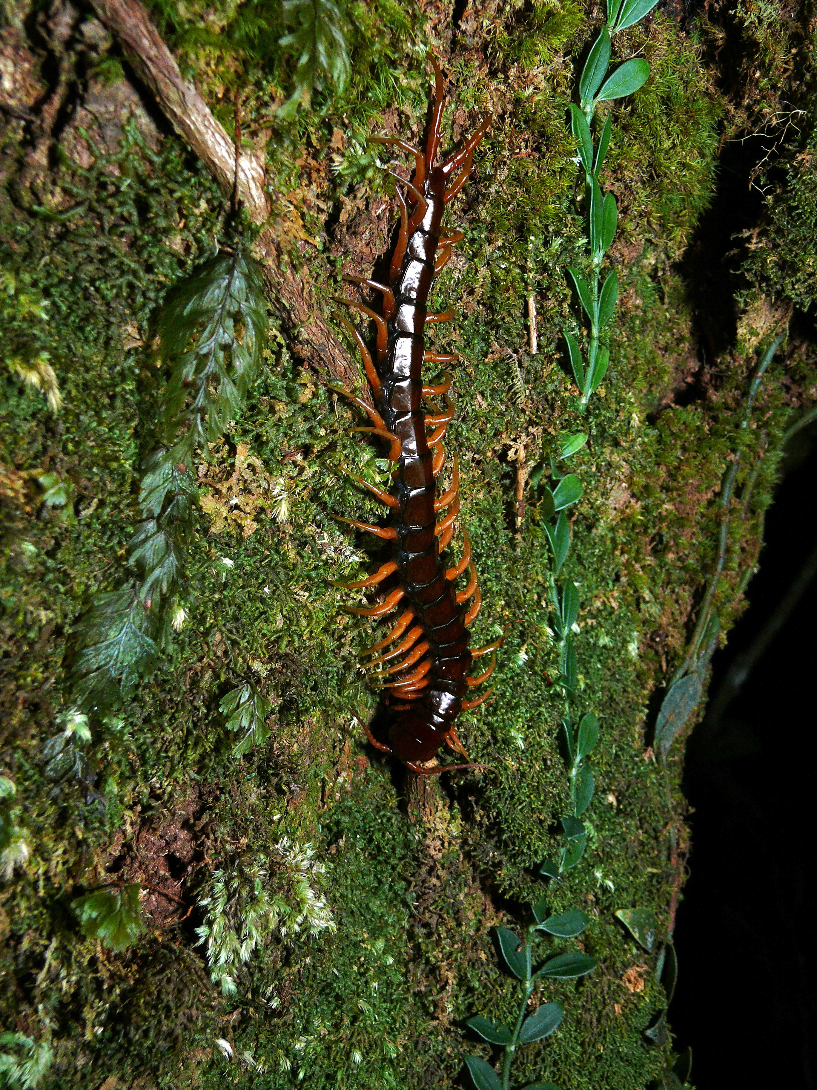 Mount Kinabalu NP, Sabah, MALAYSIA